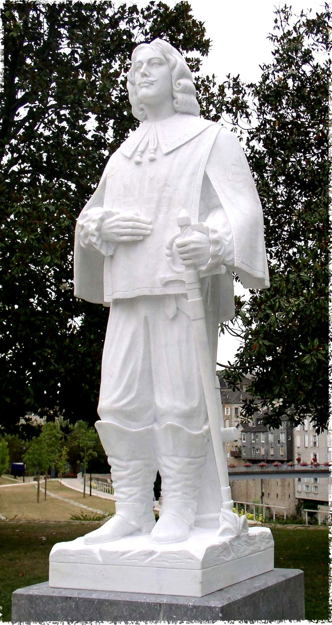 Statue du comte de Tréville à Oloron, photographie fournie par Joseph Miqueu. ©éréales Kille® | | Speak to me | en ce 28 août 2006 à 14:15 (CEST)